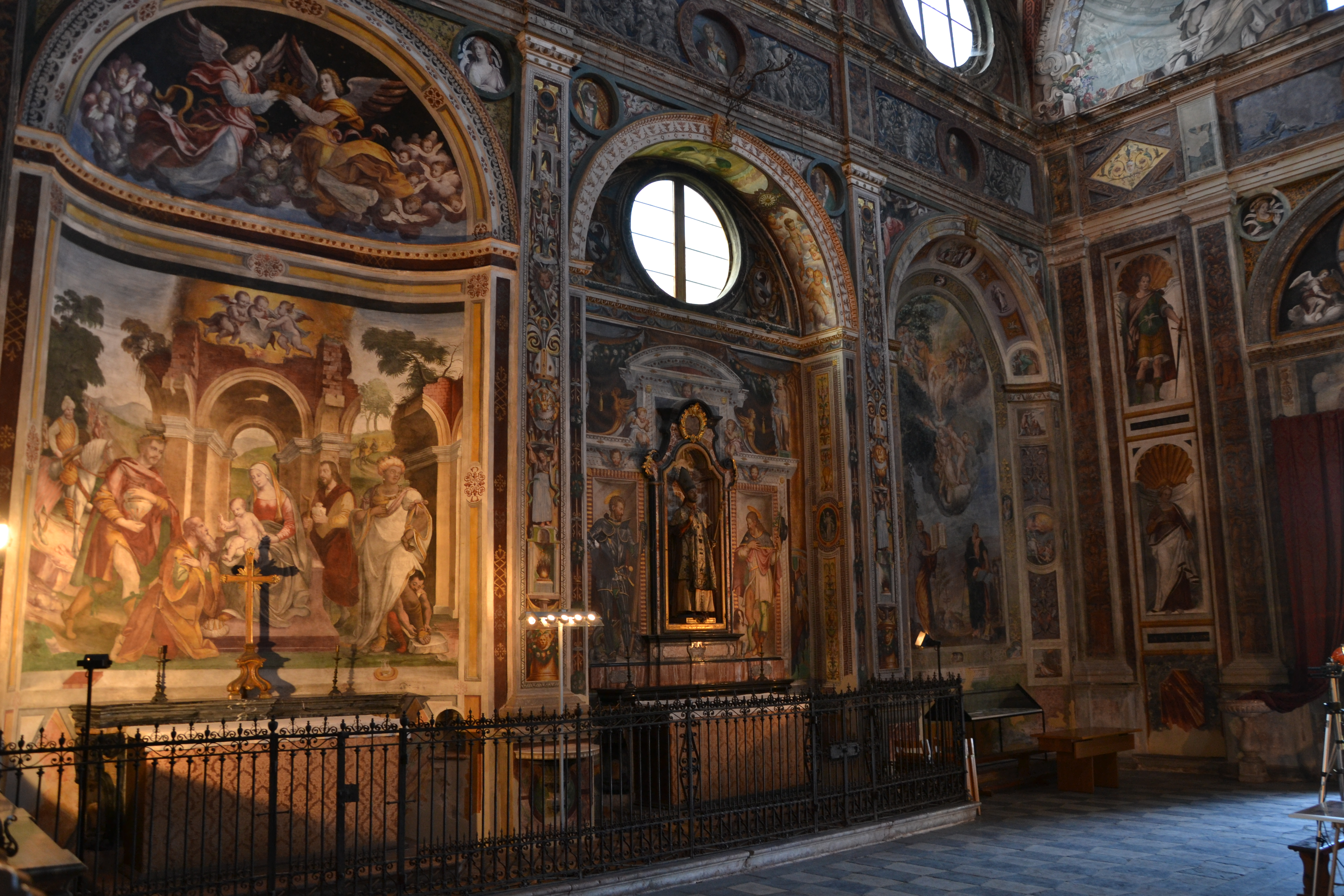 Chiesa di San Vittore (Meda). ricostruita nel Cinquecento e già annessa ad un importante monastero femminile della città appartenente all'ordine benedettino. É decorata internamente con un vasto ciclo affreschi di scuola leonardesca di tale estensione da essere stata soprannominata "Cappella Sistina" della Brianza. Attualmente appartiene al complesso della Villa Antona Traversi.